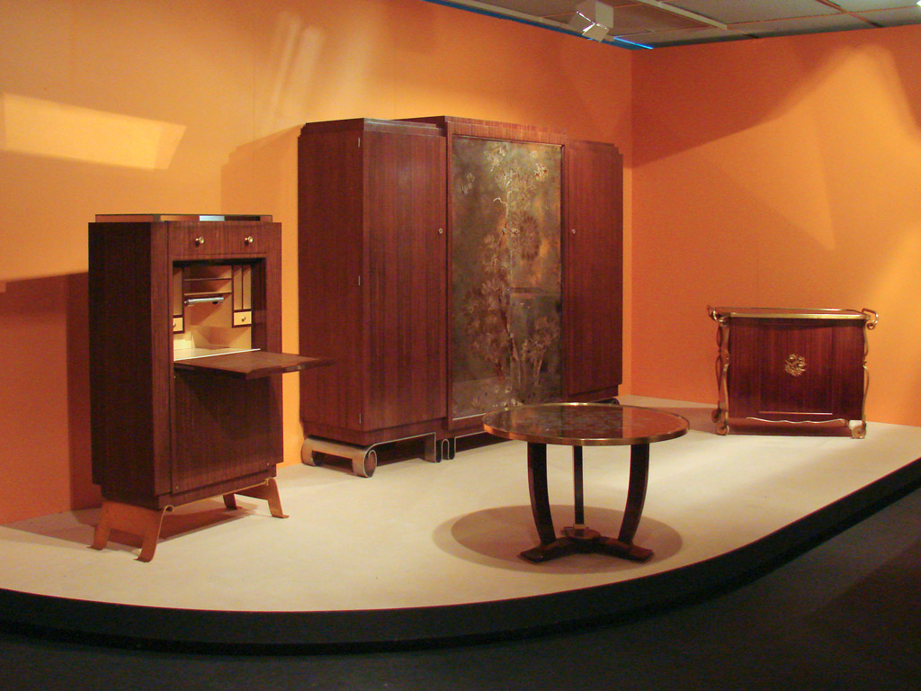 Armoire, 1937 en ébène de Macassar, verre églomisé, piètement en métal chromé de Subes (ferronnier) ; Secrétaire, 1938 en ébène de Macassar, métal et miroir ; Table ronde, 1938, plateau en verre églomisé ; Bar, 1947, en acajou